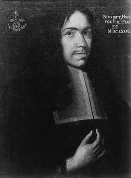 Gemälde in der Professorengalerie Tübingen